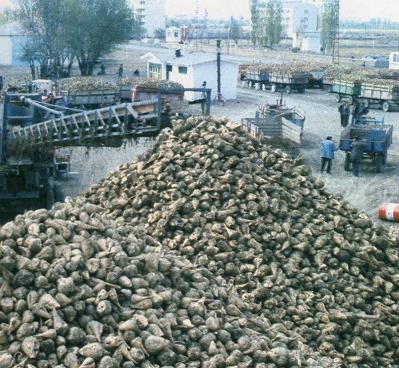 Igdir Beet